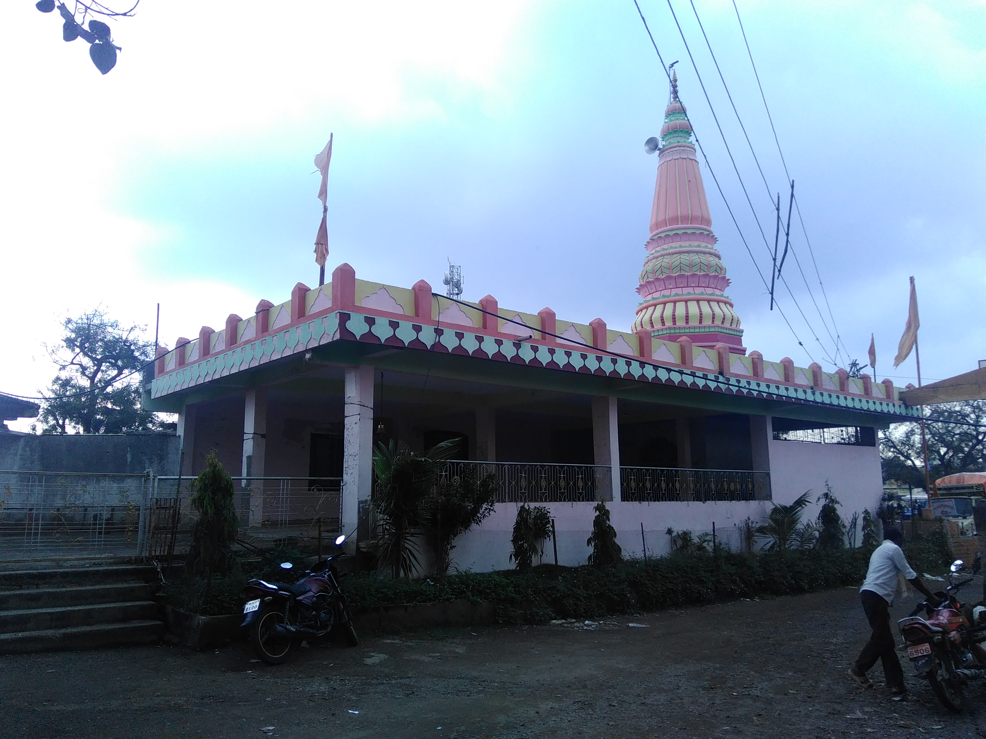 हनूमान मंदिर, खासगाव